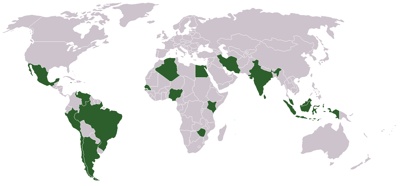 Legenda: Laranja: Estados Membros do G15